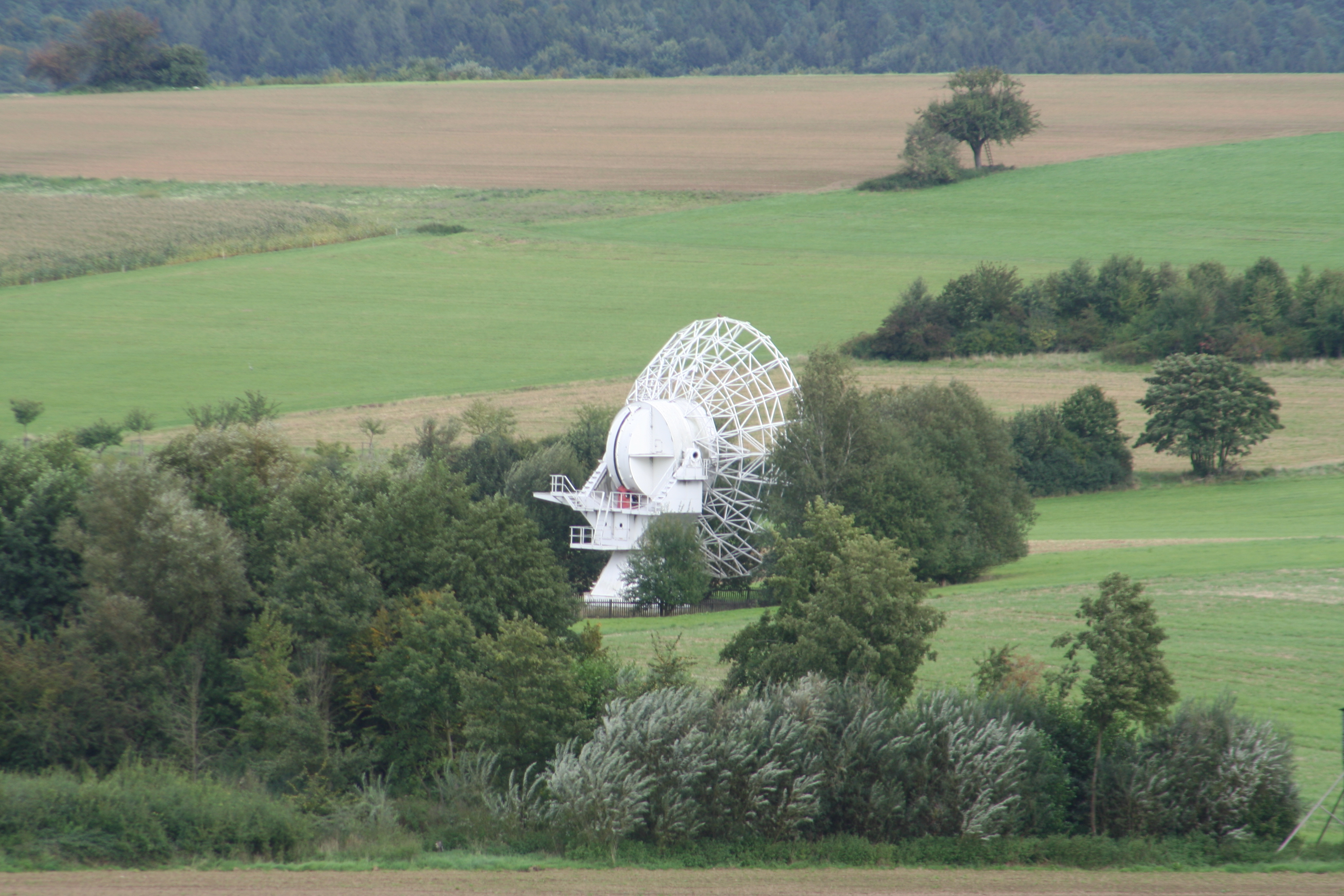 Die einzige verbliebene Parabolantenne der ESOC-Bodenstation Michelstadt